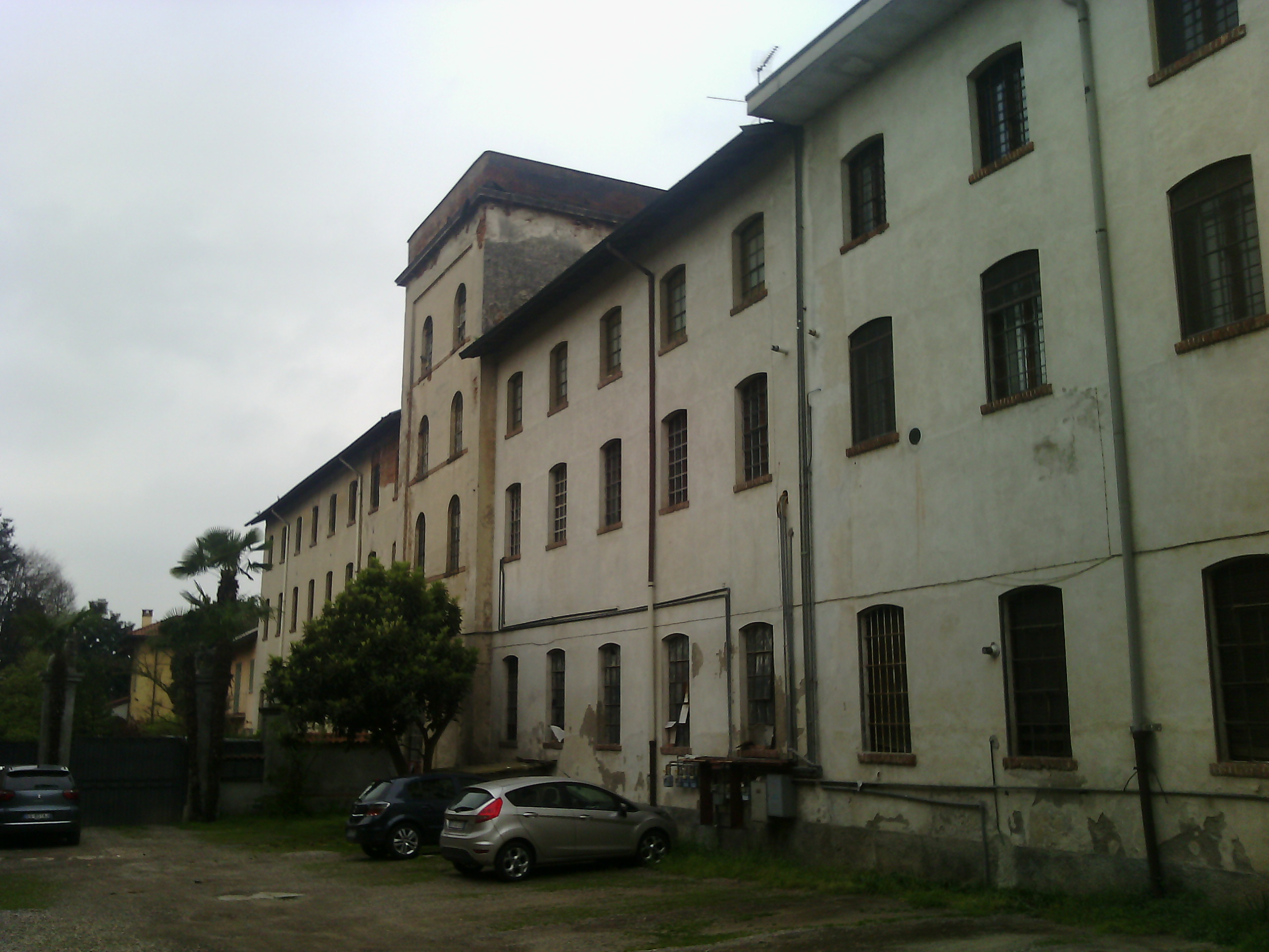 La filanda Mylius a Boffalora sopra Ticino (MI) - Italy